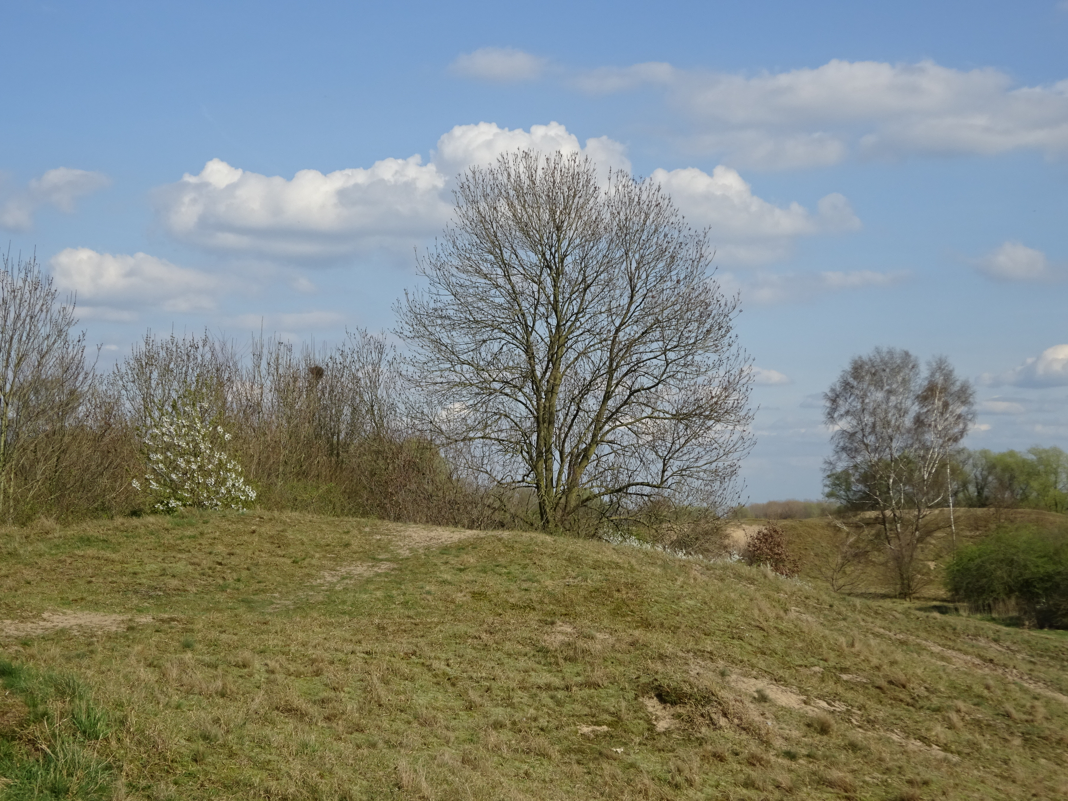 Wisseler Dünen, Kalkar-Wisse, voorjaar